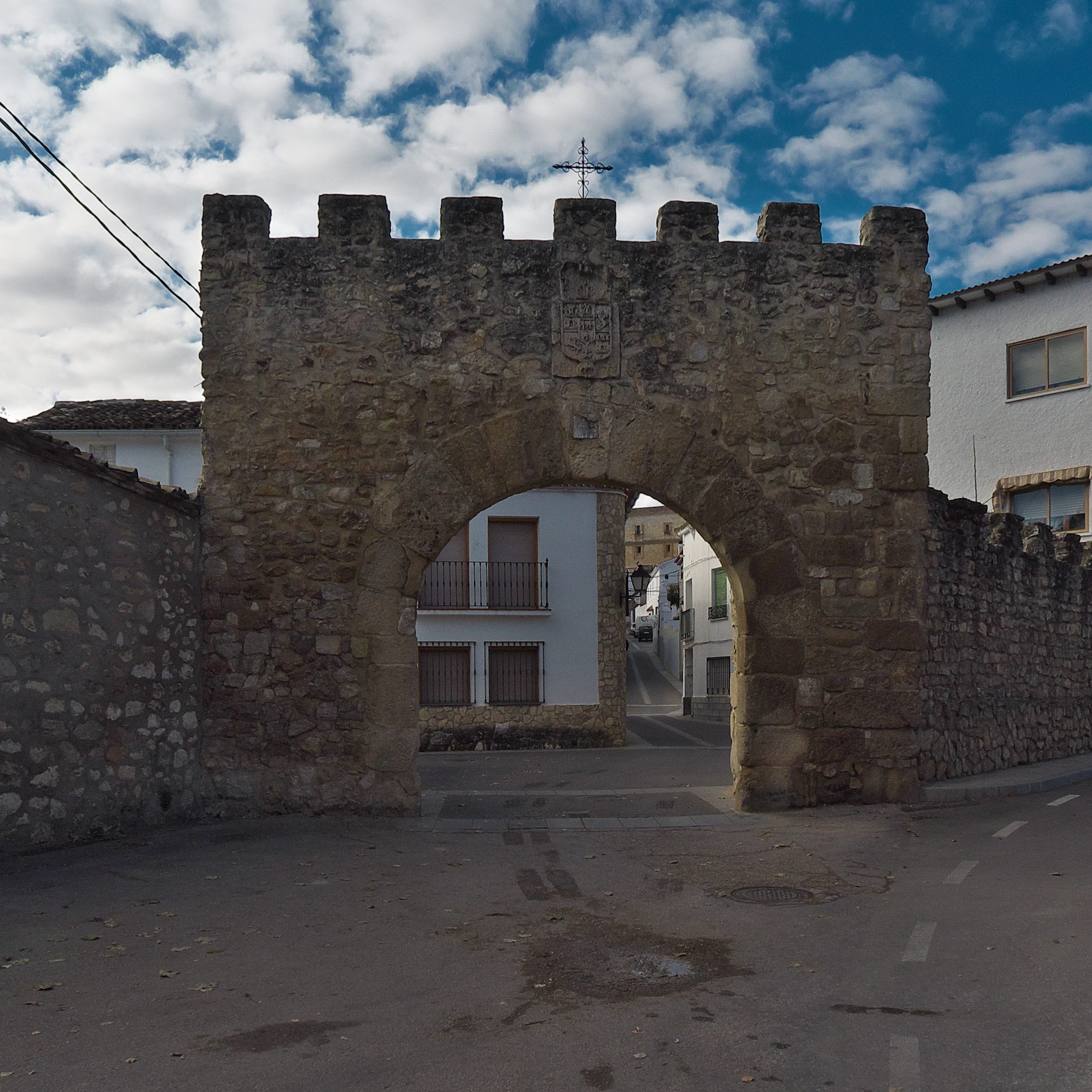 Uclés disponía de un importante recinto fortificado